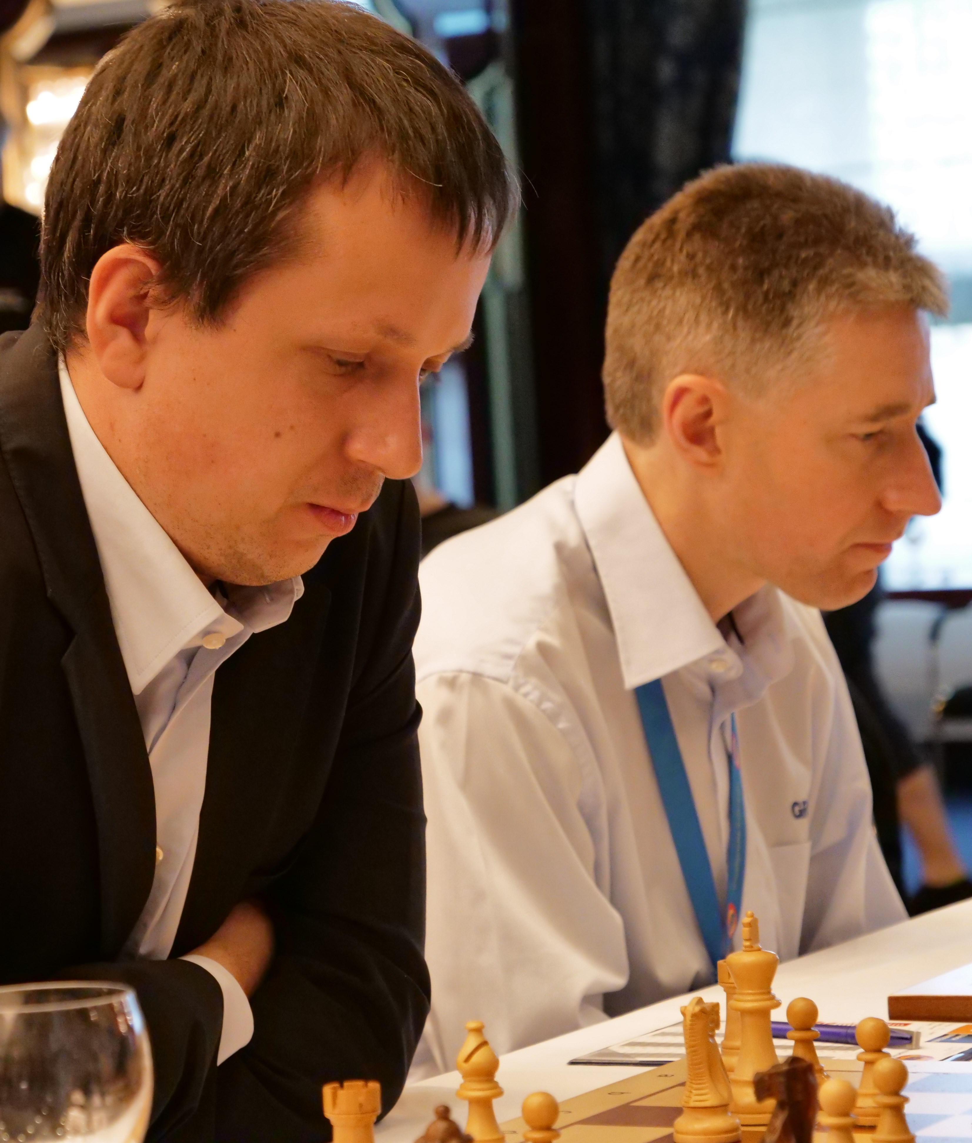 Wojtaszek und Adams Bundesliga-Endrunde 30-4-2018